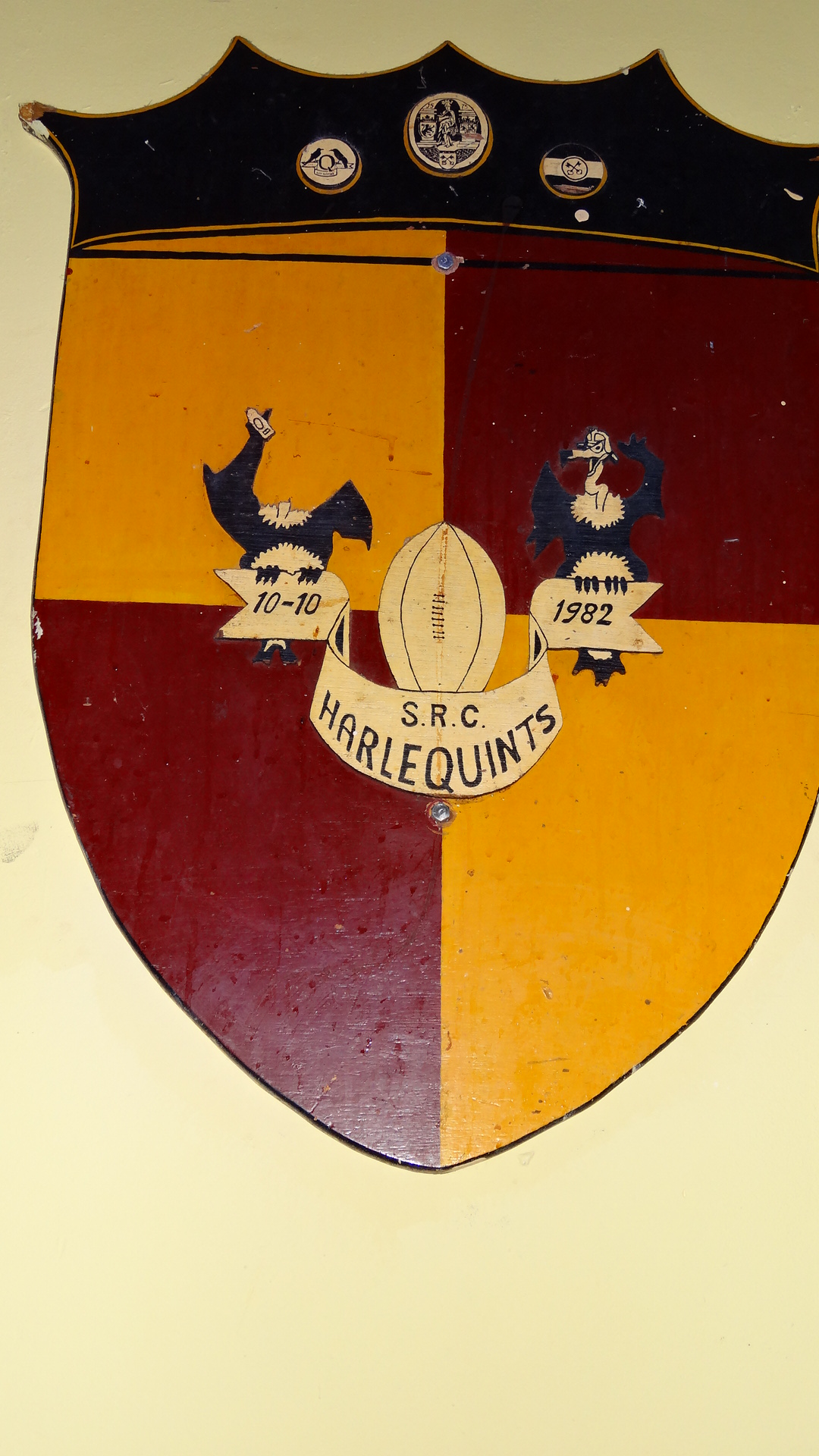 Harlequints SRC shield